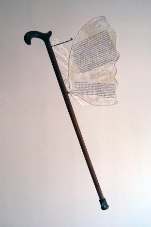 2008 "כל זמן שאוכל – אכתוב"